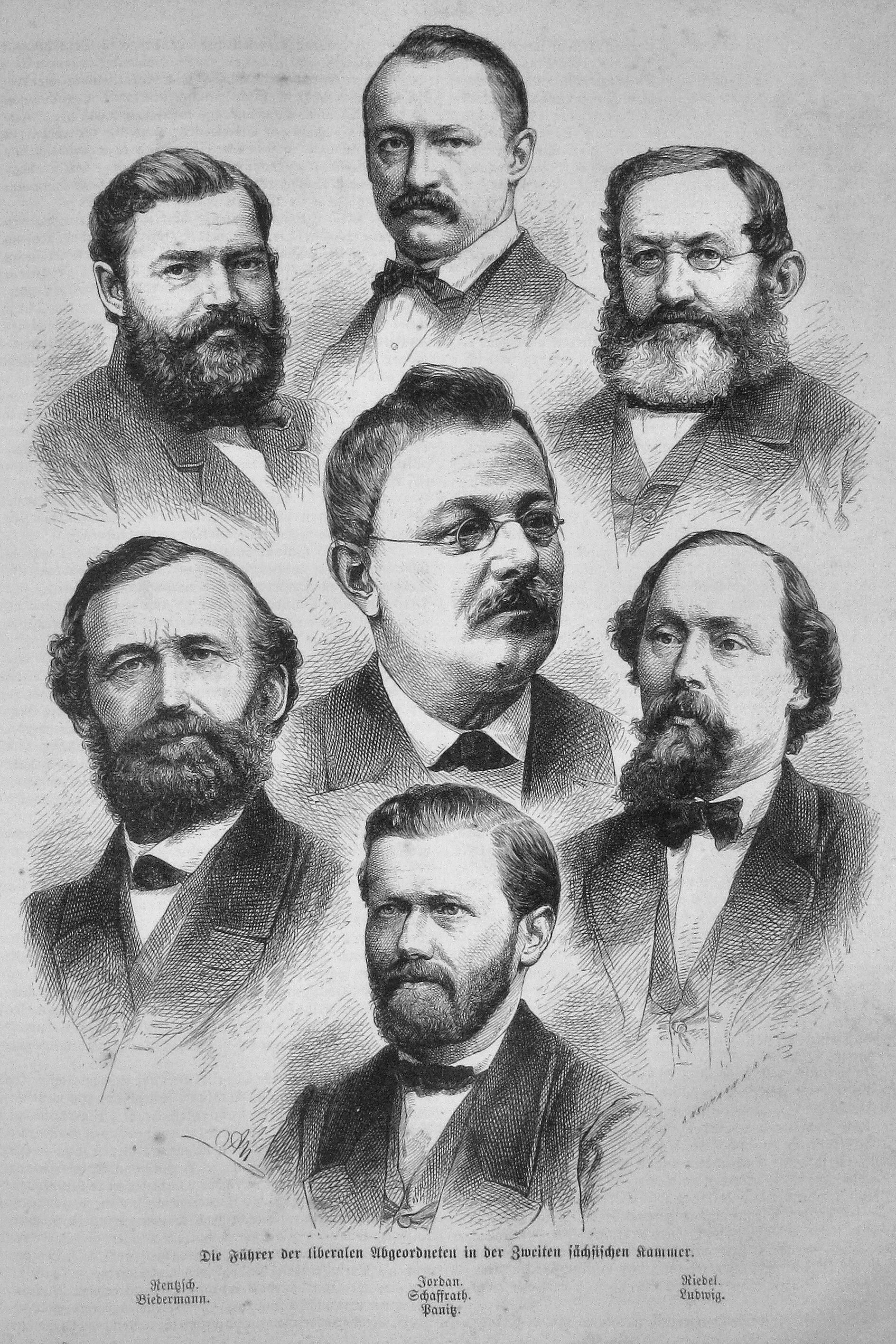 Die Führer der liberalen Abgeordneten in der Zweiten Kammer [des Sächsischen Landtags] Obere Reihe (v.l.n.r.): Hermann Rentzsch Ernst Jordan Christian Gottlieb Riedel Mitte Wilhelm Schaffrath Untere Reihe (v.l.n.r.) Karl Biedermann Johann Karl Gottlob Panitz Richard Ludwig